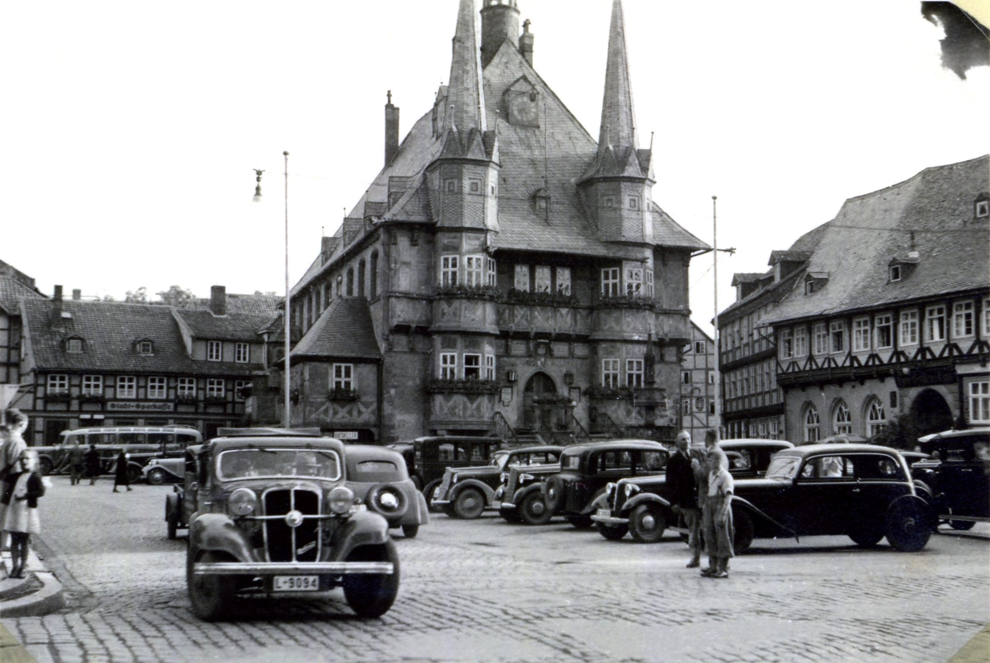 Blick auf den Marktplatz und das Rathaus von Wernigerode im Jahr 1937; zu den Fahrzeugen: rechts in der Reihe parkender Autos und nur die mit der Front zu uns stehenden, von hinten nach vorn, Opel Kadett oder Olympia (da das Bild von 1937 ist es wahrscheinlich ein Olympia), Opel 2 Liter, BMW (wegen Doppelniere, wahrscheinlich ein 319). Was fährt auf uns zu? Ich sage ein Hanomag Garant, frühes Modell, noch mit Hanomag-Emblem oben im Kühlerrahmen. Noch eine Ergänzung zur rechten Reihe. Das Auto ganz vorn, von dem die Front von den drei Personen verdeckt wird, da sage ich, ist ein DKW vermutlich ein F2.